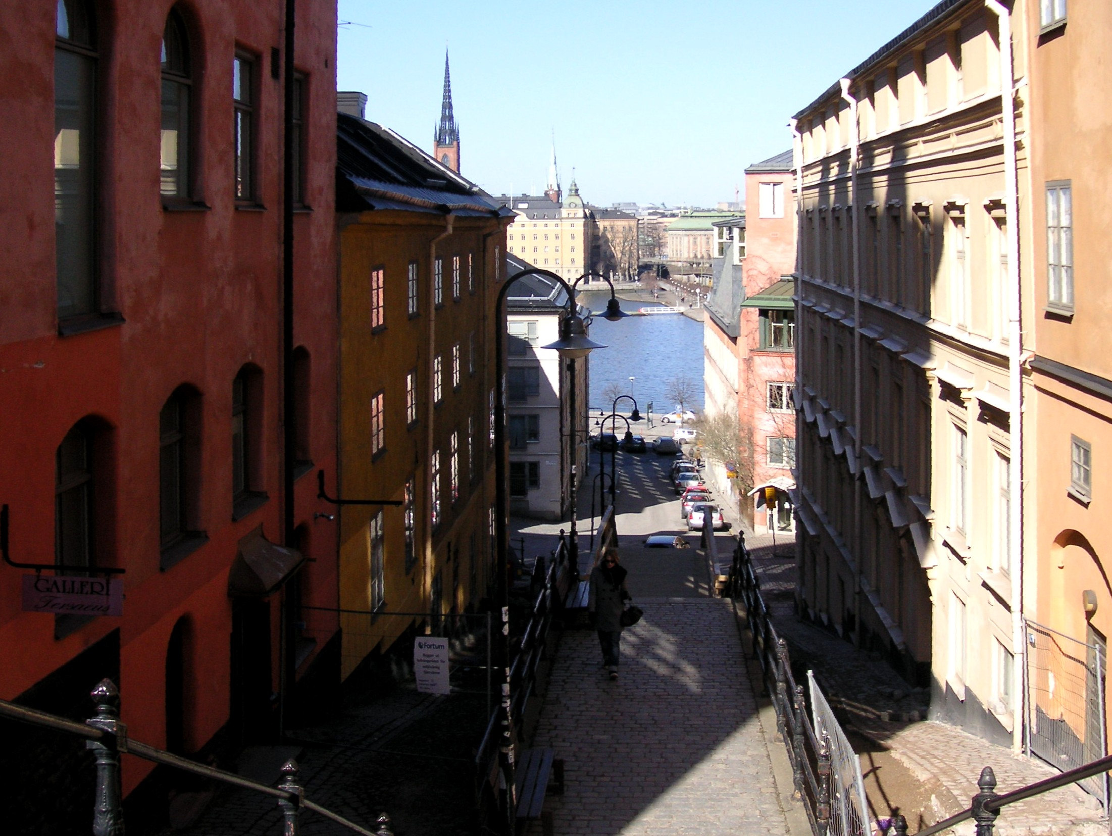 Pustegränd på Södermalm i Stockholm, i bakgrunden Riddarfjärden och Riddarholmskyrkan